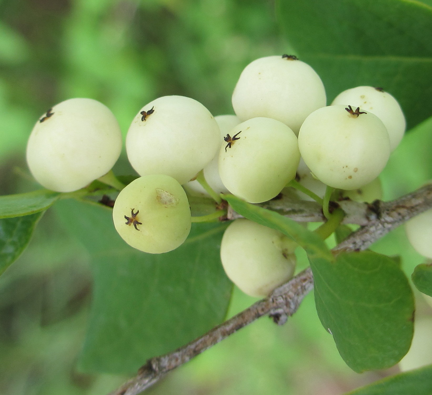 Flueggea virosa - berries